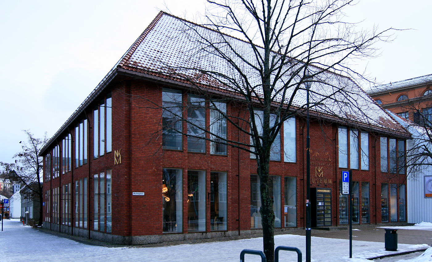 Nordenfjeldske kunstindustrimuseum, Trondheim. Bygd 1968, tegna av Herman Krag Arkitektkontor.